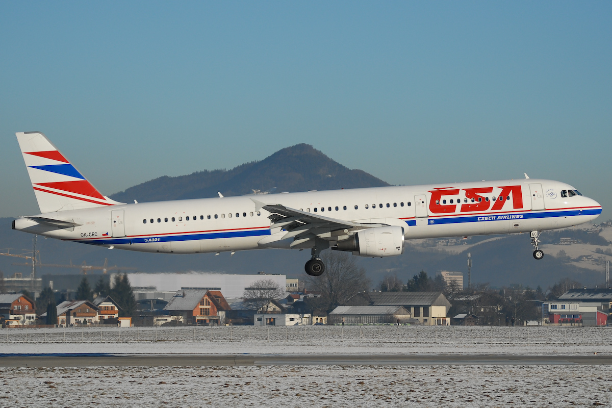 Czech Airlines A321 landet in Salzburg